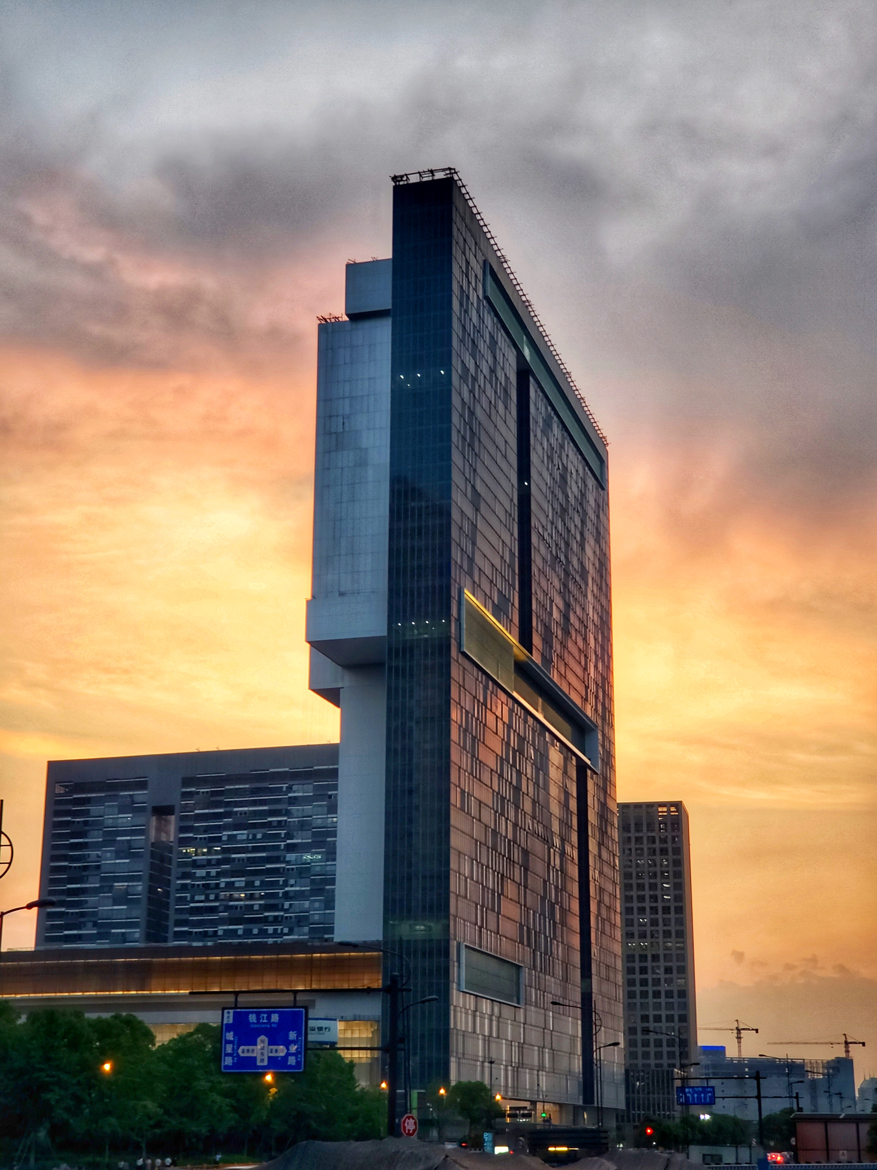 中文（中国大陆）: 夕阳下的杭州高德置地广场